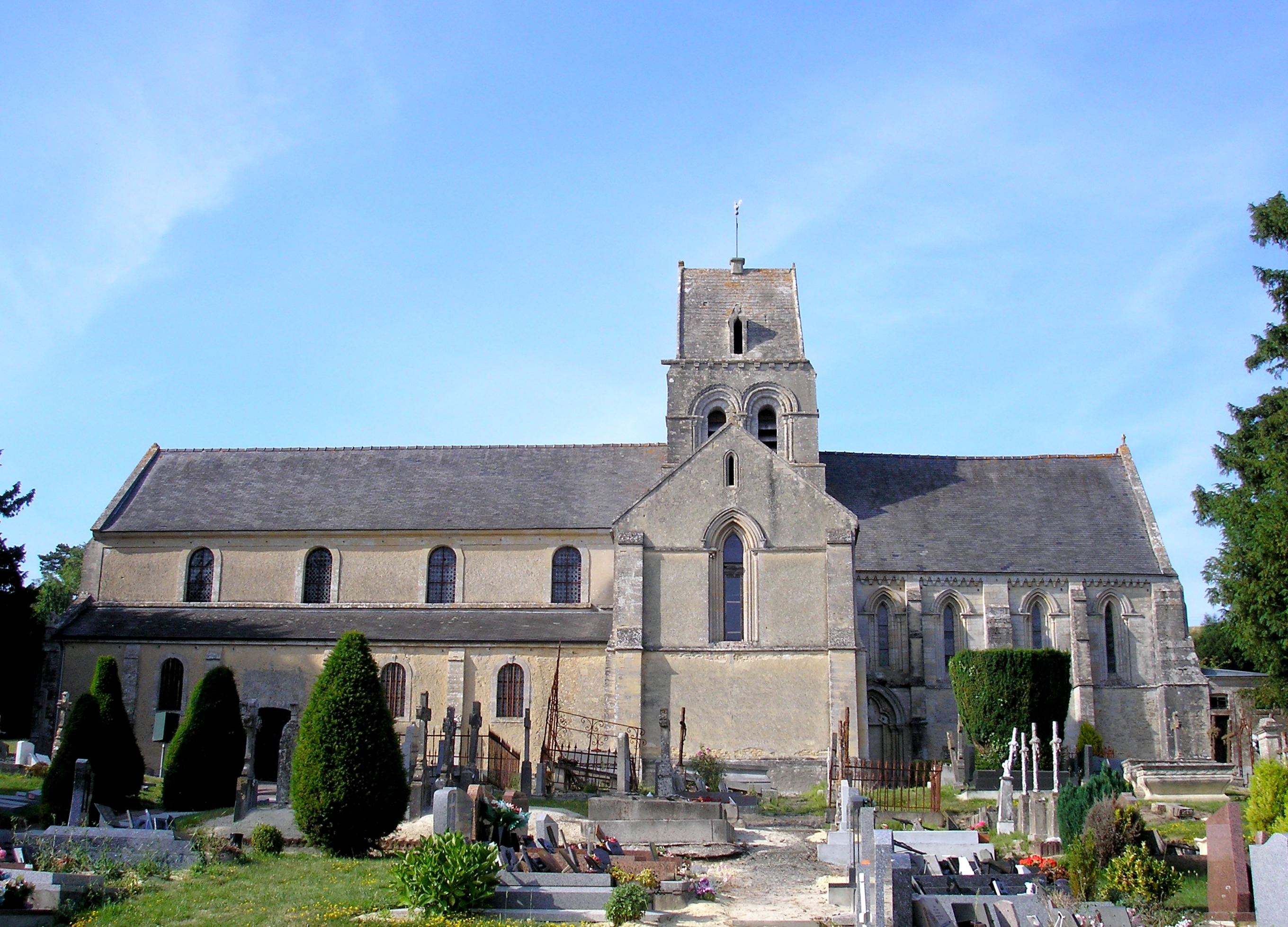 Ryes (Normandie, France). L'église Saint-Martin.